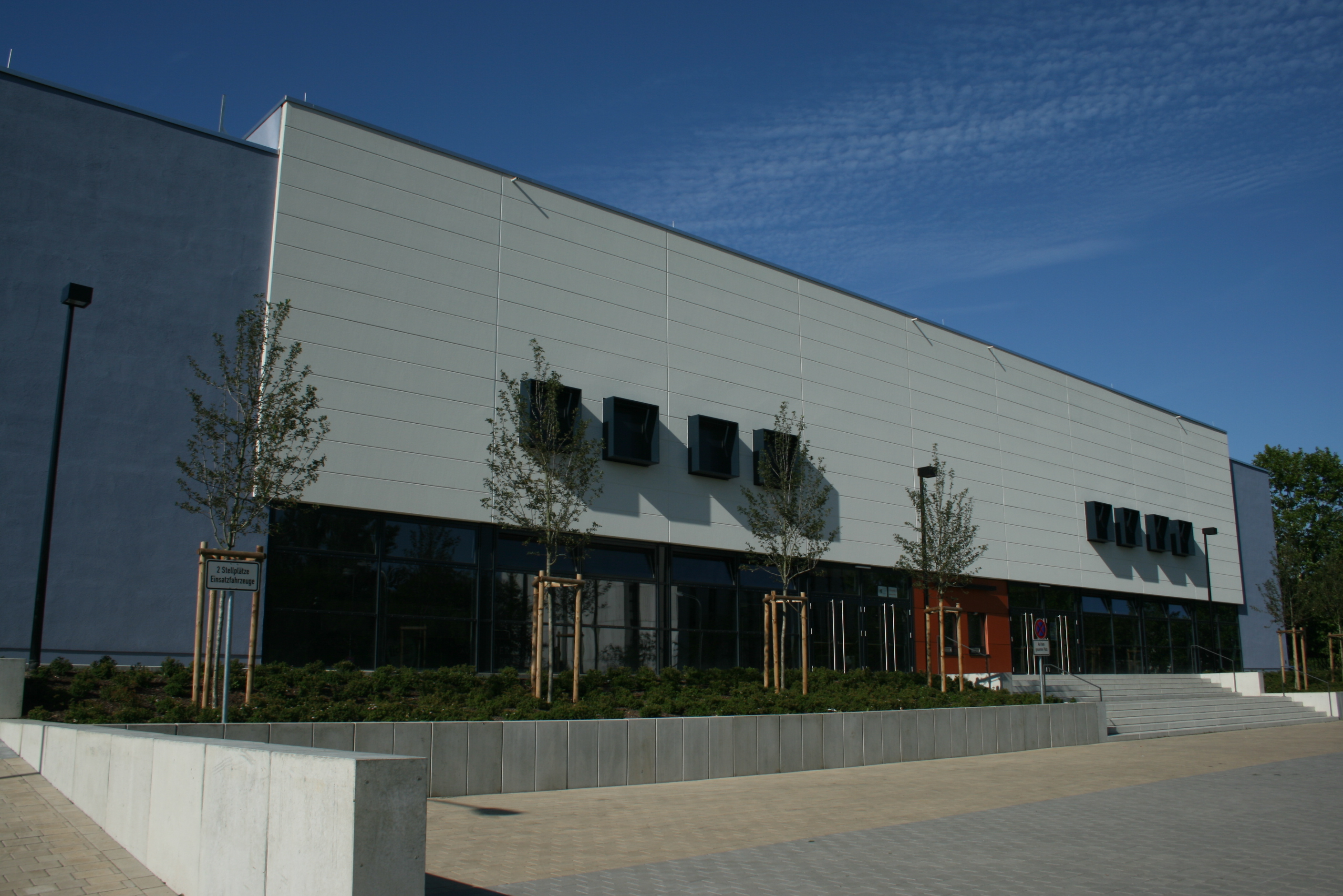 Osthalle in Gießen/Gym Hall "Osthalle" in Giessen, Germany